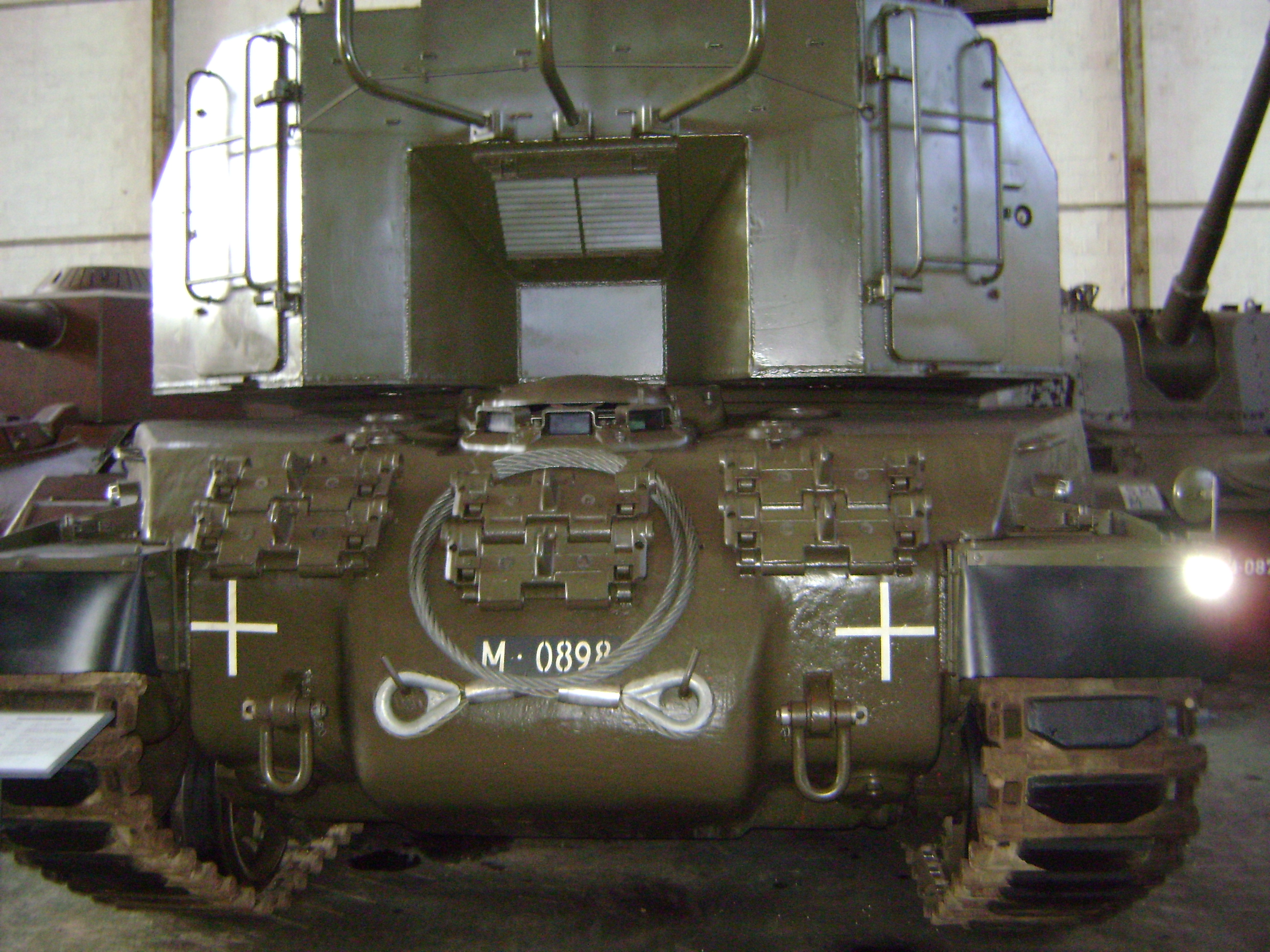 Panzerkanone68 front